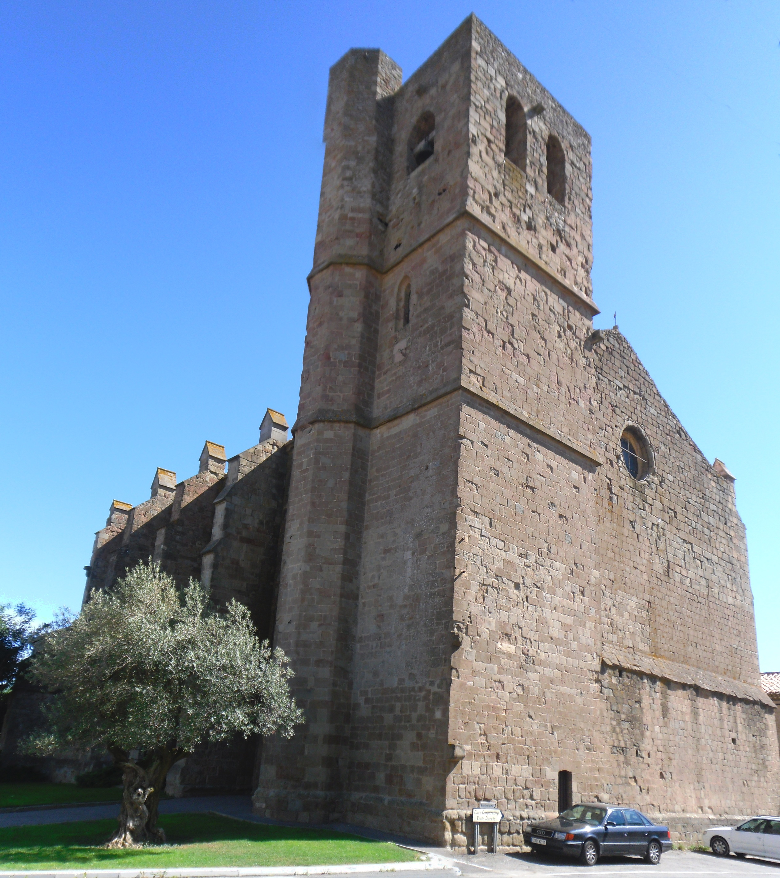 Église Saint-Etienne Pépieux